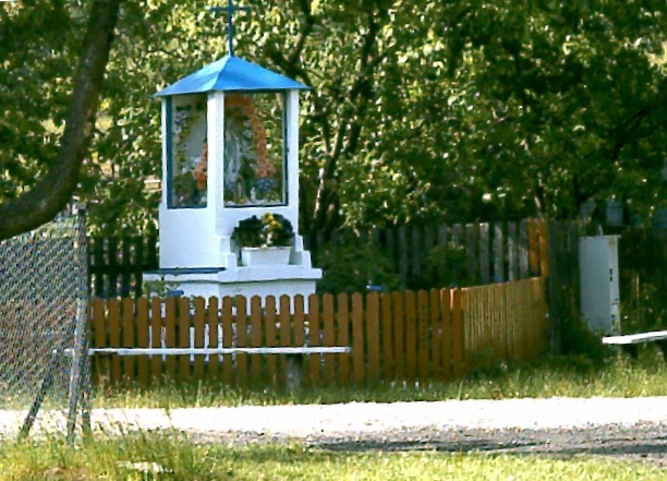 Mącznik - kapliczka